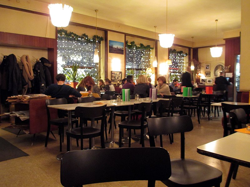 Café Korb, Wien